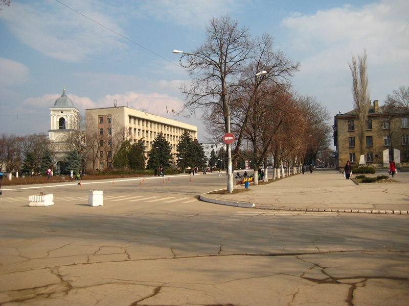 Площадь Освобождения - бывший центр торговли